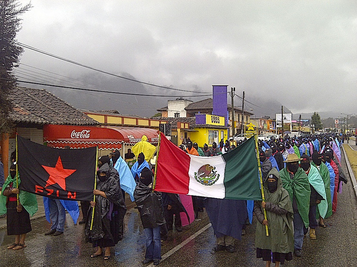 For